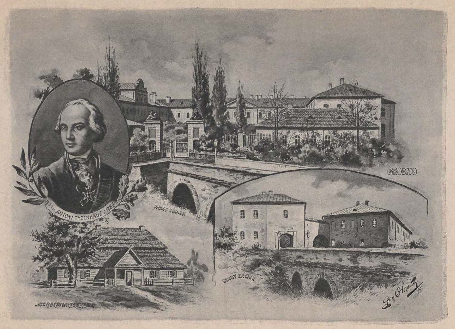 Беларуская (тарашкевіца): Горадня (Horadnia): Новы і Стары замкі, Марачоўшчына (Maračoŭščyna), Антоні Тызэнгаўз (Antoni Tyzenhaus)